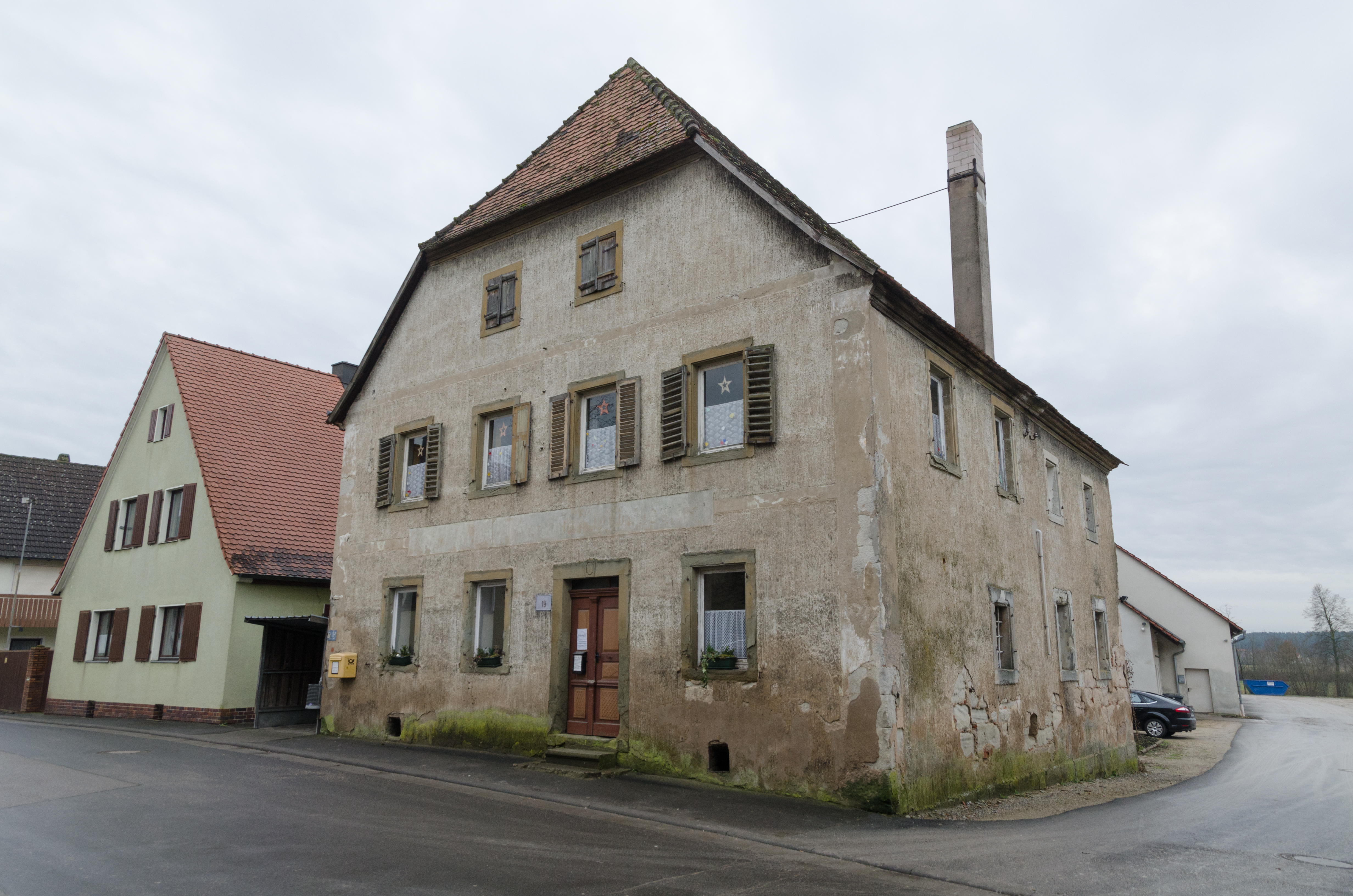 Lonnerstadt, Hauptstraße 19